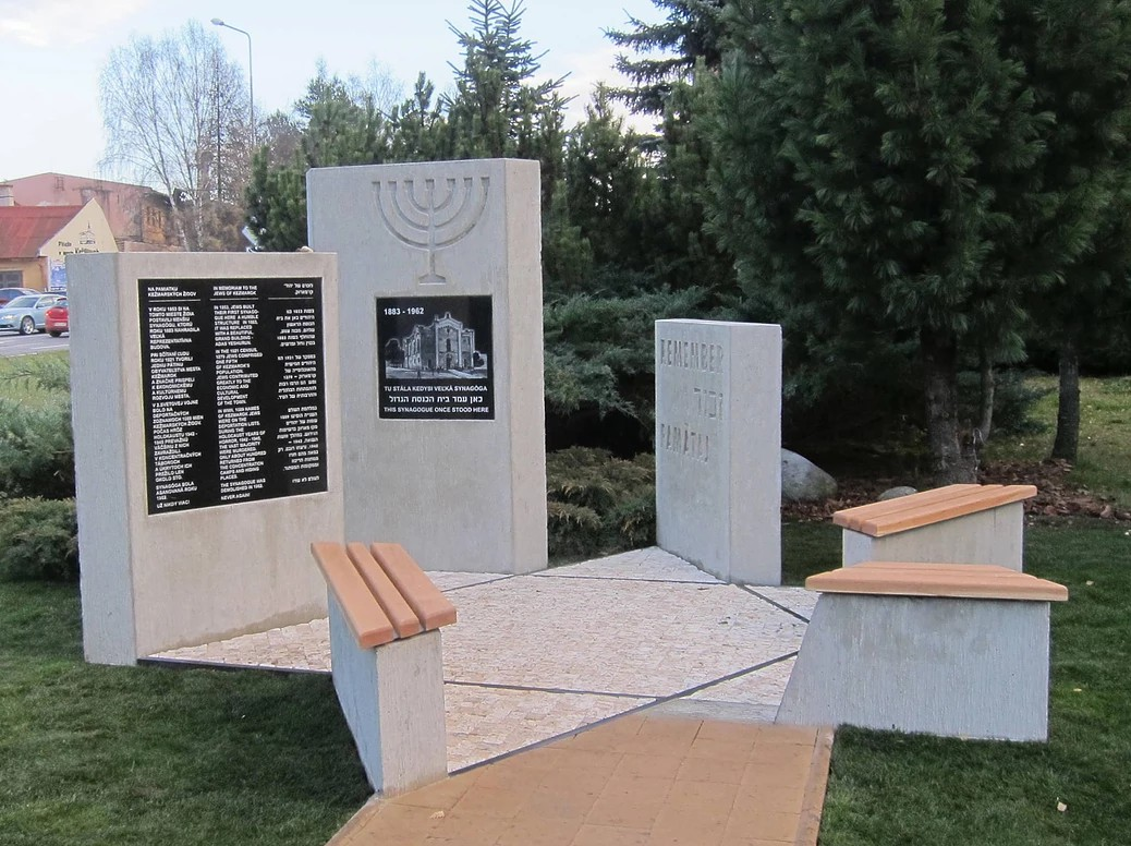 אנדרטה בית הכנסת בקז'מרוק